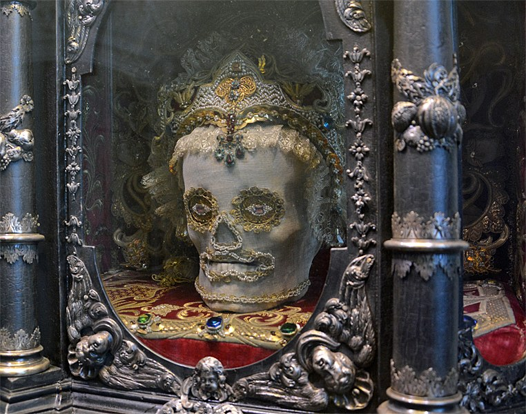 Reliquie der hl. Viktoria von Rom in der Kartause Ittingen